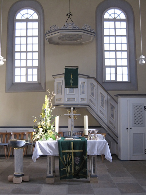 Ansicht von Altar und Kanzel sowie Taufstein der Prot. Kirche Dackenheim